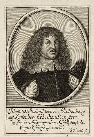 Grafik aus dem Klebeband Nr. 1 der Fürstlich Waldeckschen Hofbibliothek Arolsen Motiv: Johann Wilhelm von Stubenberg